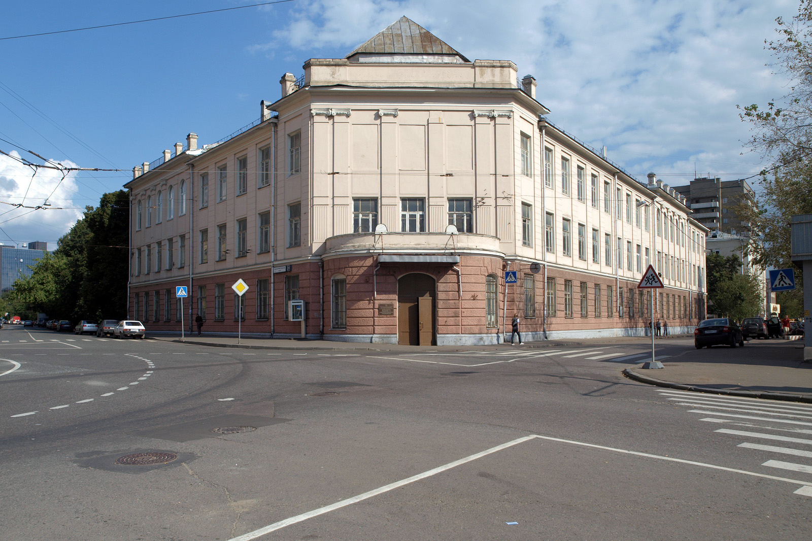 Москва, угол Малой Пироговской (налево) и Десятилетия Октября (направо).